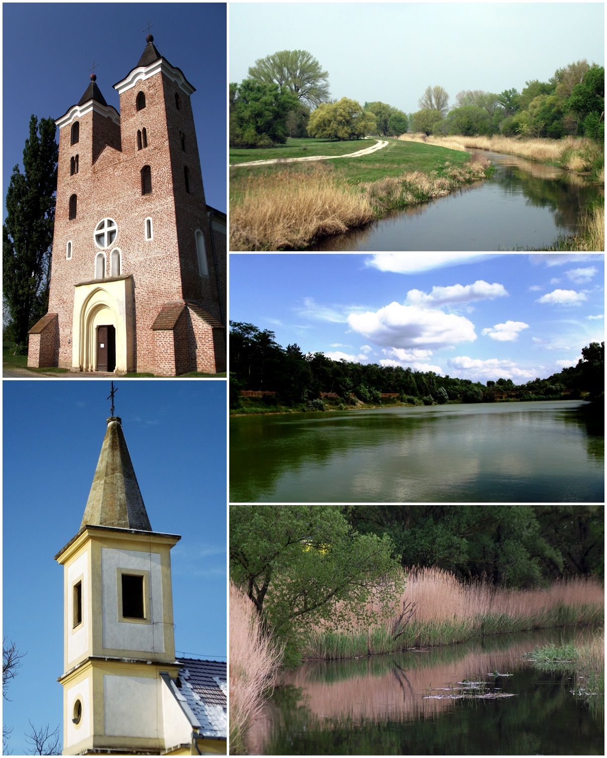 Szent Jakab apostol templom, Mórichidai evangélikus templom, Marcal part, Kaszalapi tó, Marcal és a Csikvándi-Bakony-ér